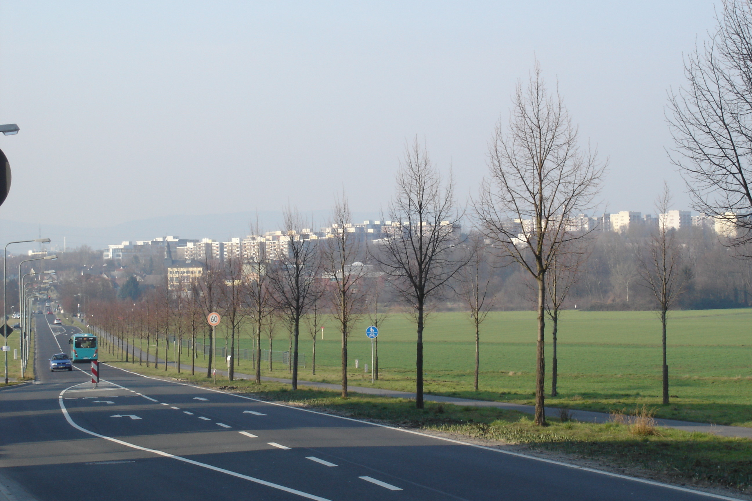 Homburger Landstraße von Frankfurter-Berg ins Niddatal und nach Bonames